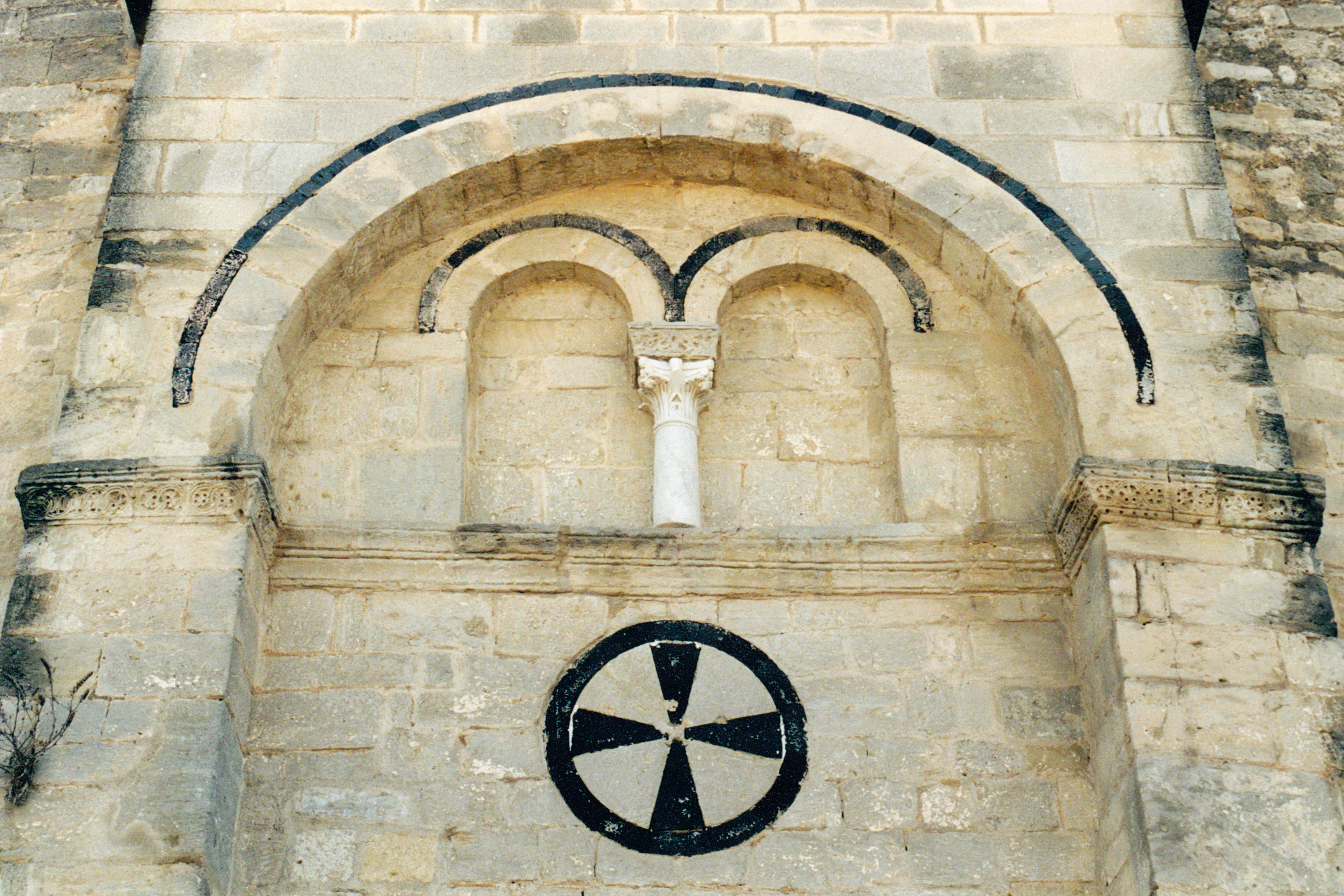 France - Languedoc - Aude - Église Saint-Jean l’Évangéliste d'Ouveillan